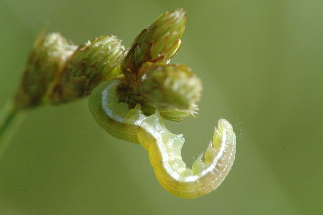 Picture taken in Commanster, Belgian High Ardennes . Species: Deltote deceptoria caterpillar